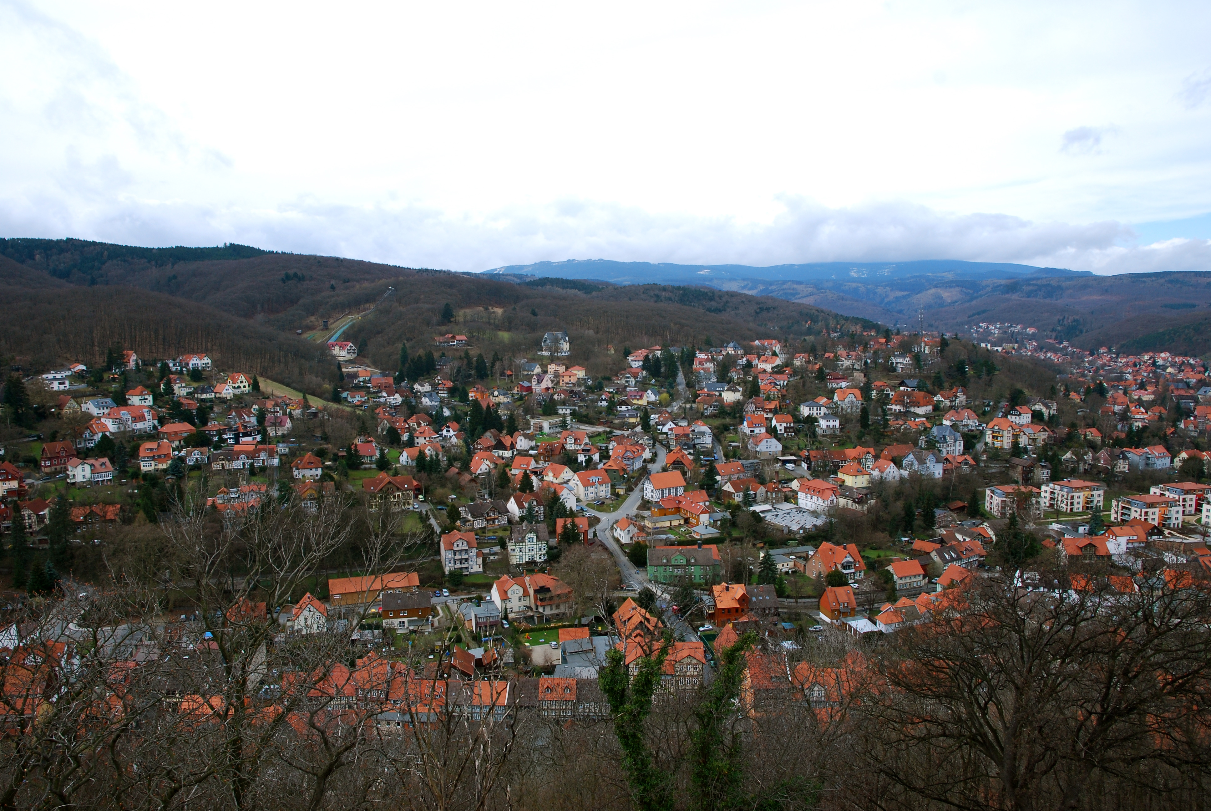 Blick vom Schloss über die Dächer der Stadt.